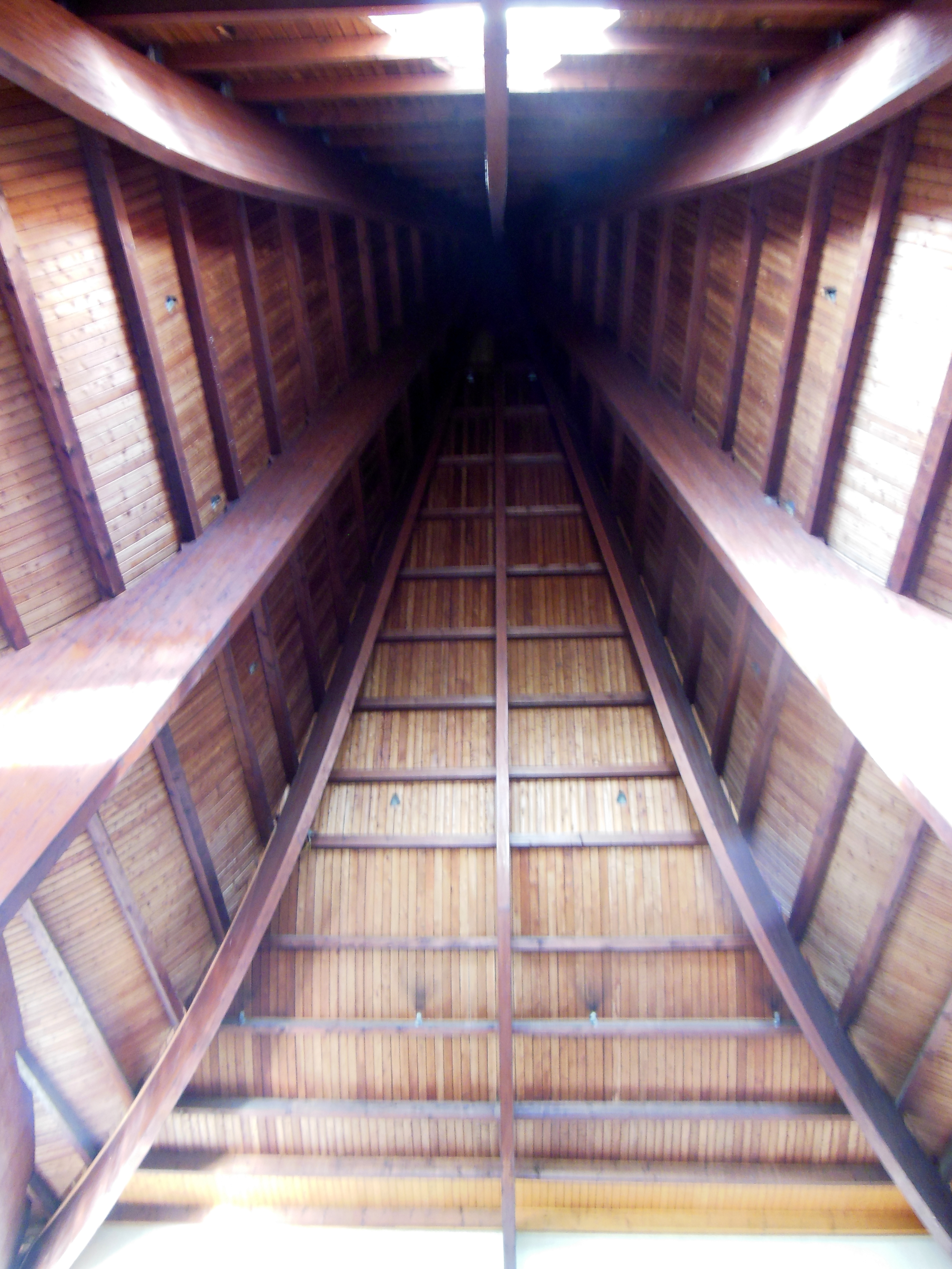 Chapelle Notre-Dame des Dunes de Mimizan-Plage (Landes, France). Charpente du clocher